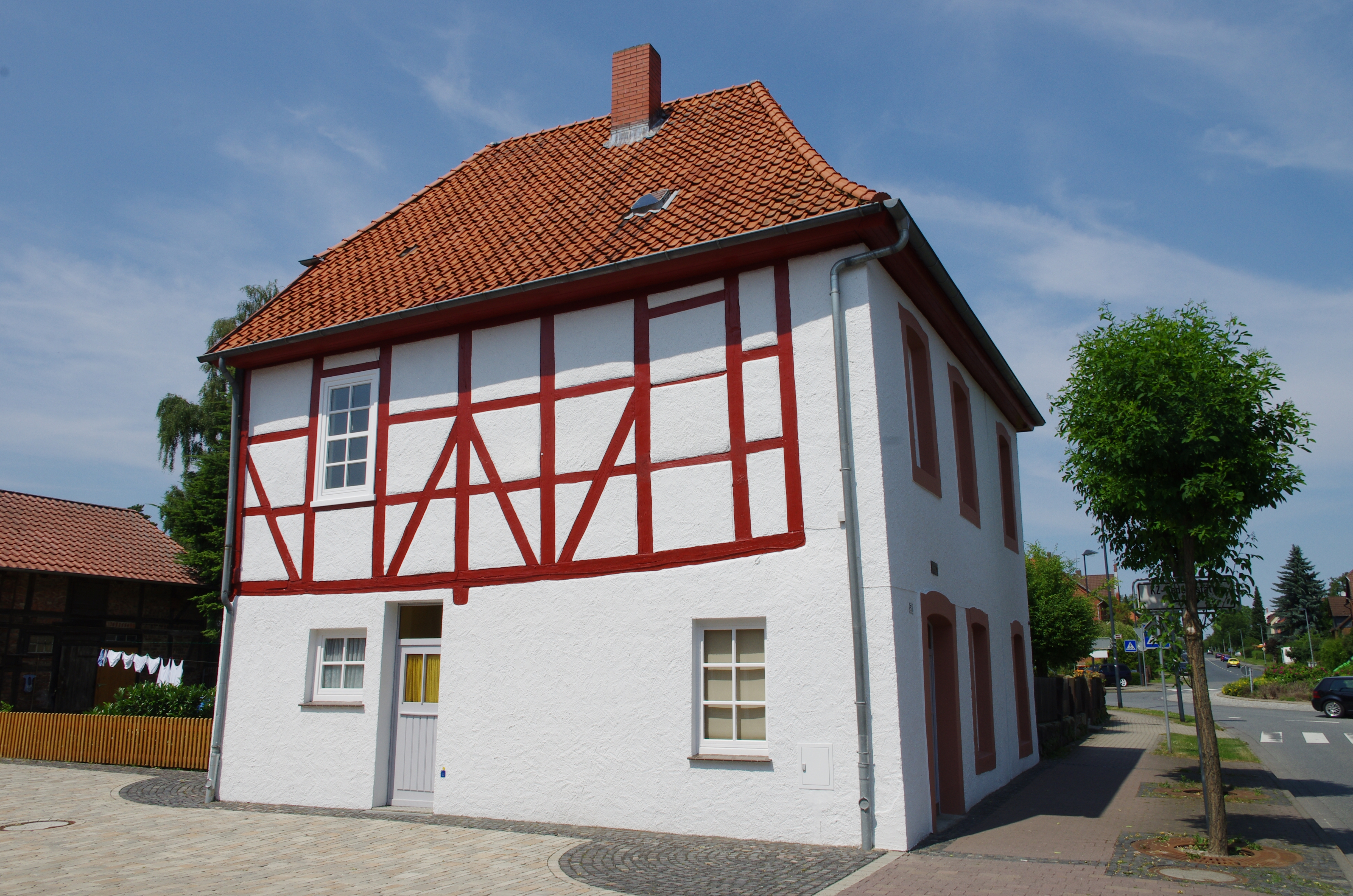 Moringen in Niedersachsen. Das Haus in der Straße Lange Straße 53 steht unter Denkmalschutz. Hier befindet sich eine KZ-Gedenkstätte.